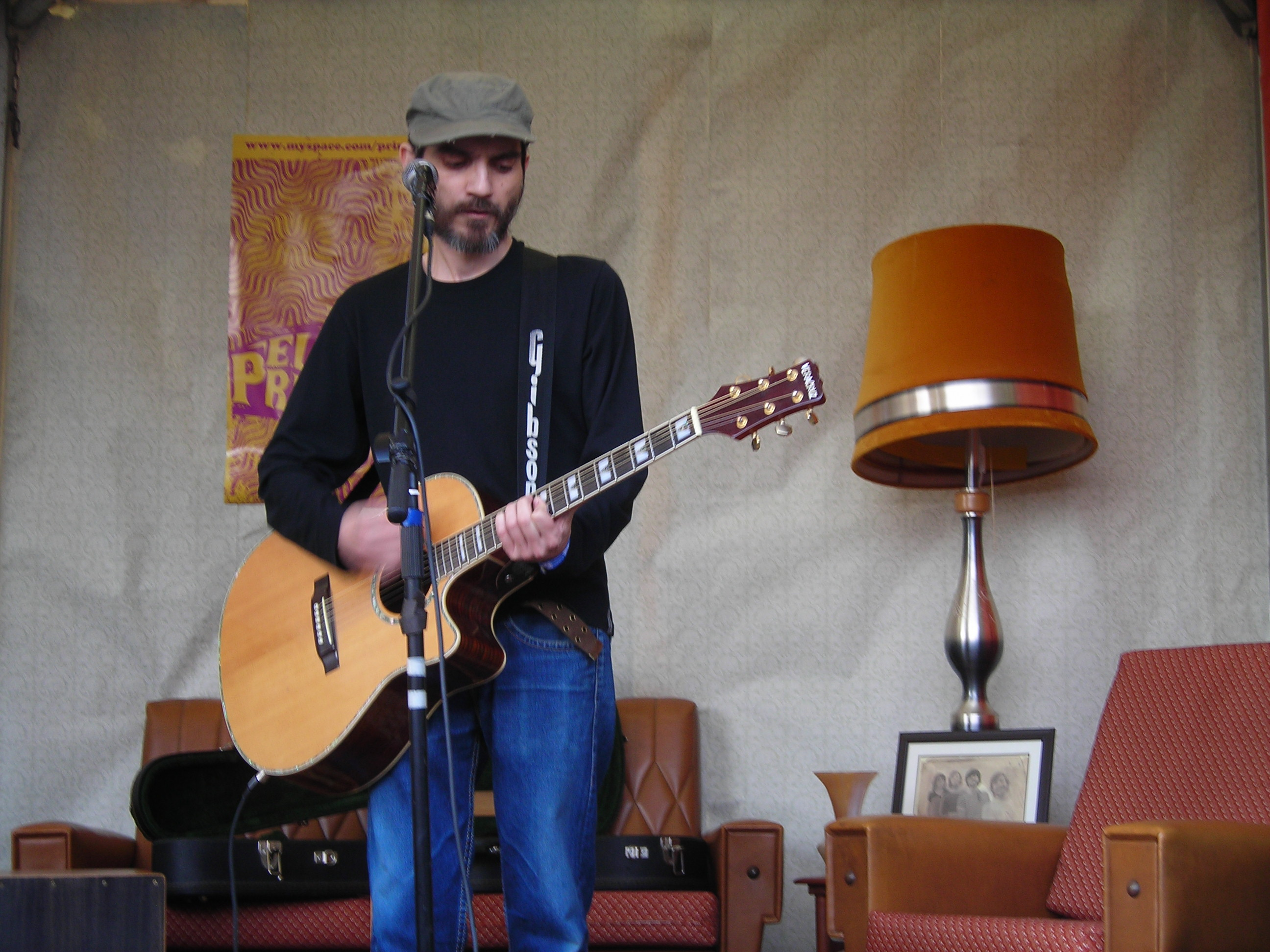 Fernando Alfaro no Primavera Sound 2007 de Barcelona.